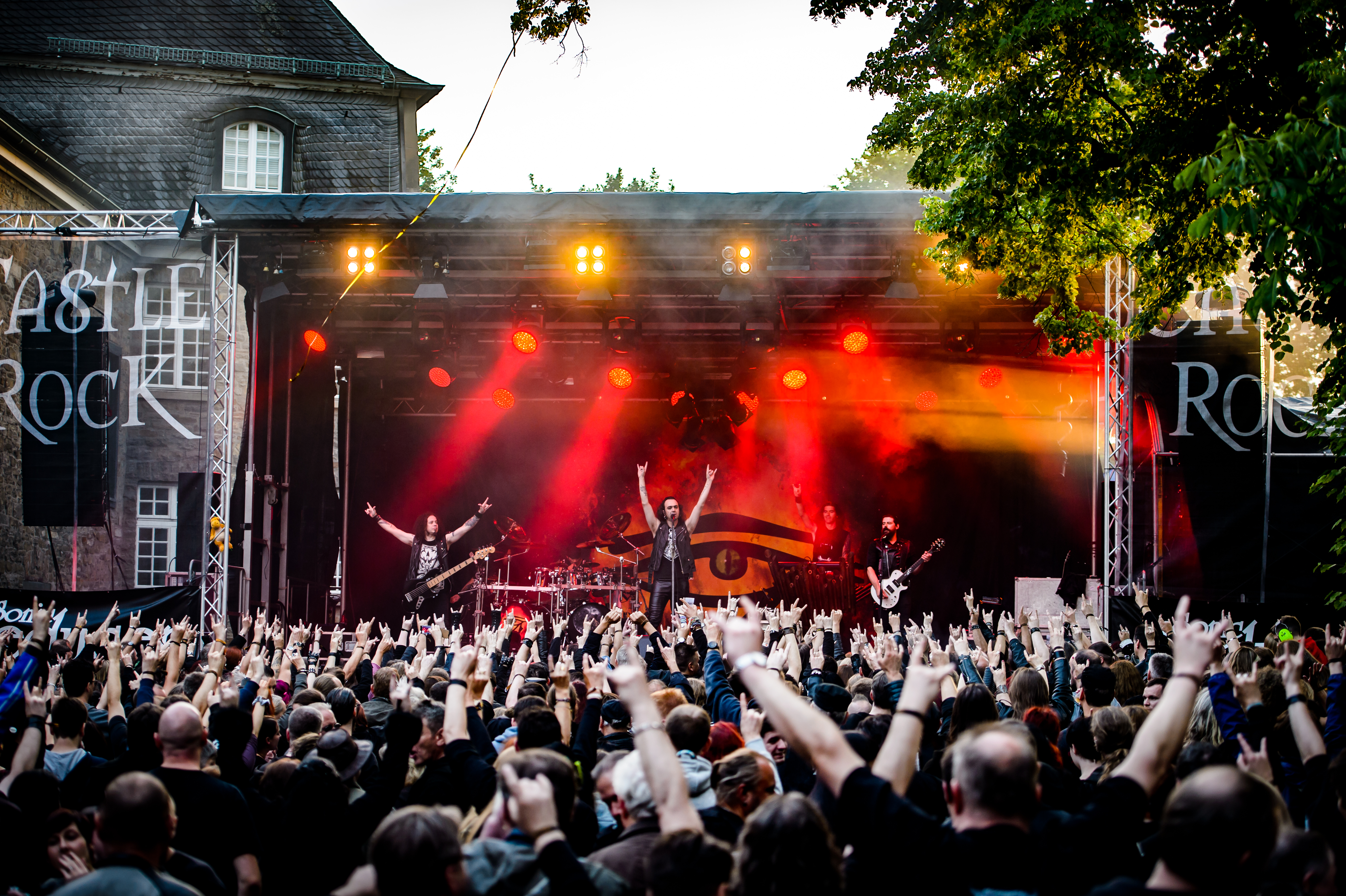 'Castle Rock 2017; Mülheim an der Ruhr': 'Moonspell'